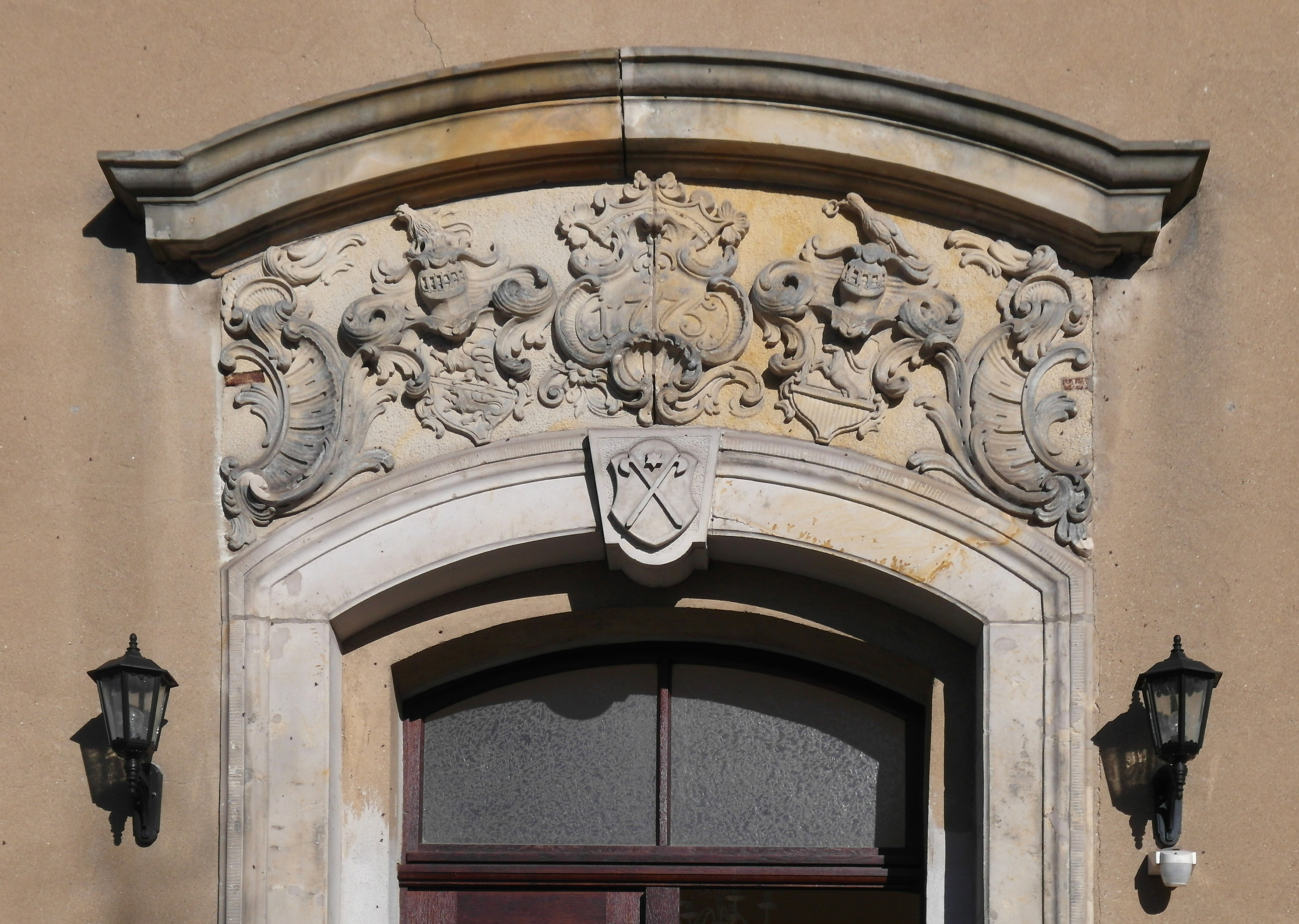 26.03.2017 02829 Deutsch-Paulsdorf (Markersdorf), Am Schloss 4: Die Supraporte zeigt das Jahr der Erbauung 1775 und die Wappen des Bauherrn Ludolf August von Ingenhaeff und seiner Ehefrau Augusta Tugendreich Wilhelmina von Rabenau. Sicht von Westen. [SAM8791.JPG]20170326465DR.JPG(c)Blobelt